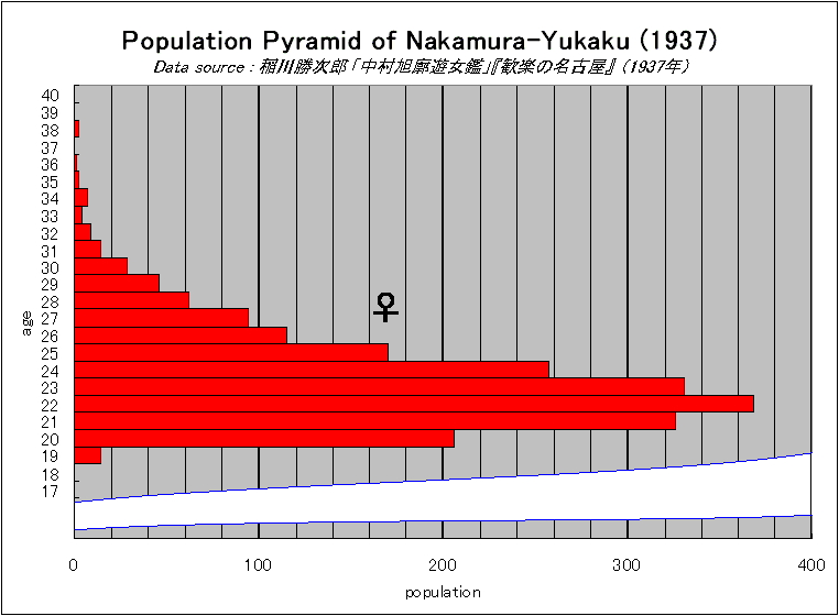 1937年当時の中村遊郭の娼妓の人口ピラミッド